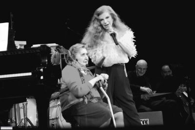 La poetessa italiana Alda Merini con la cantante Milva durante uno spettacolo.